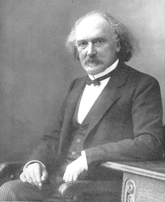 Jules Nicole (1841-1921) Jules Nicole